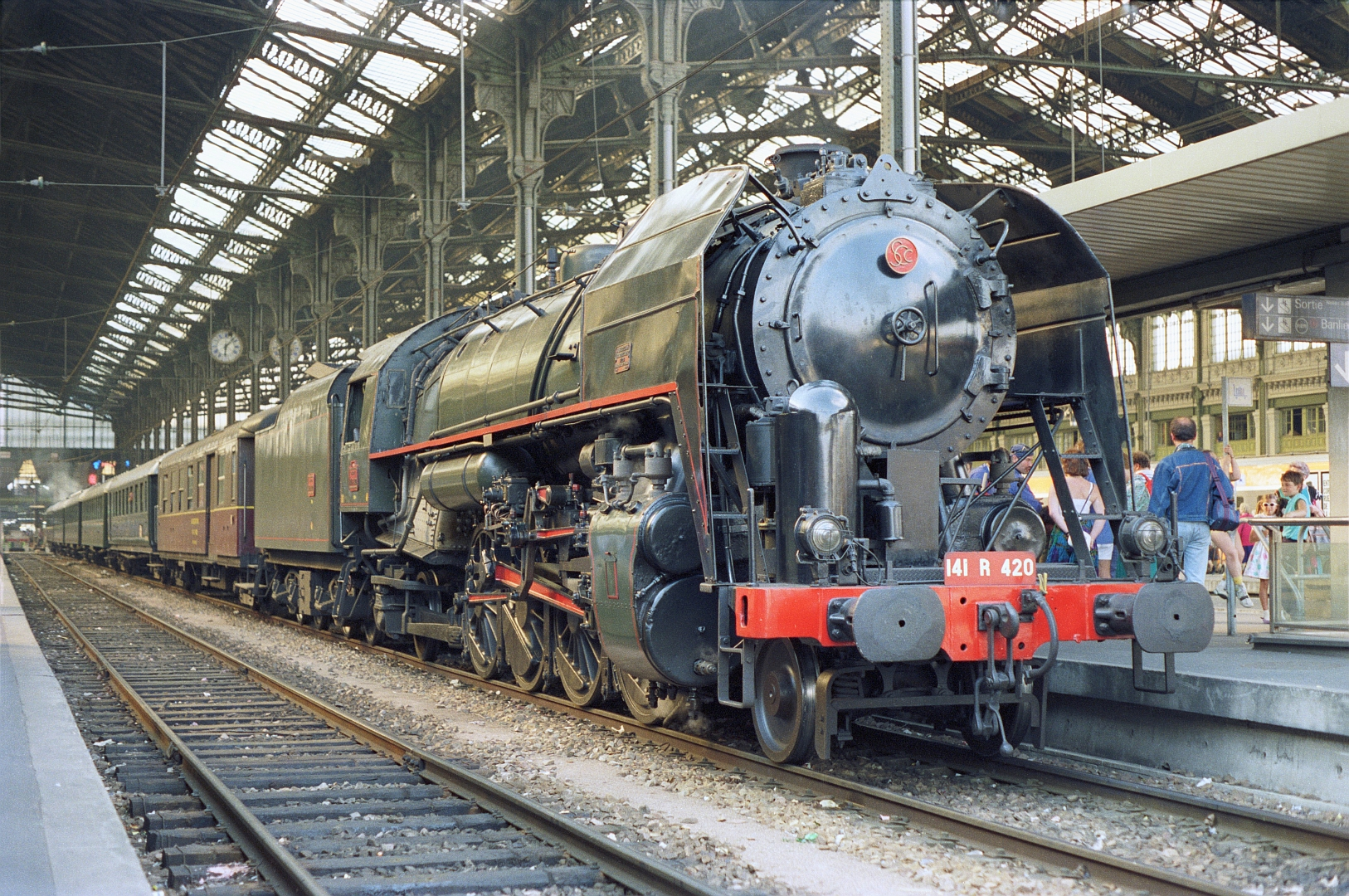 La 141 R 420 en gare de Paris-Lyon le 20 mai 1989.